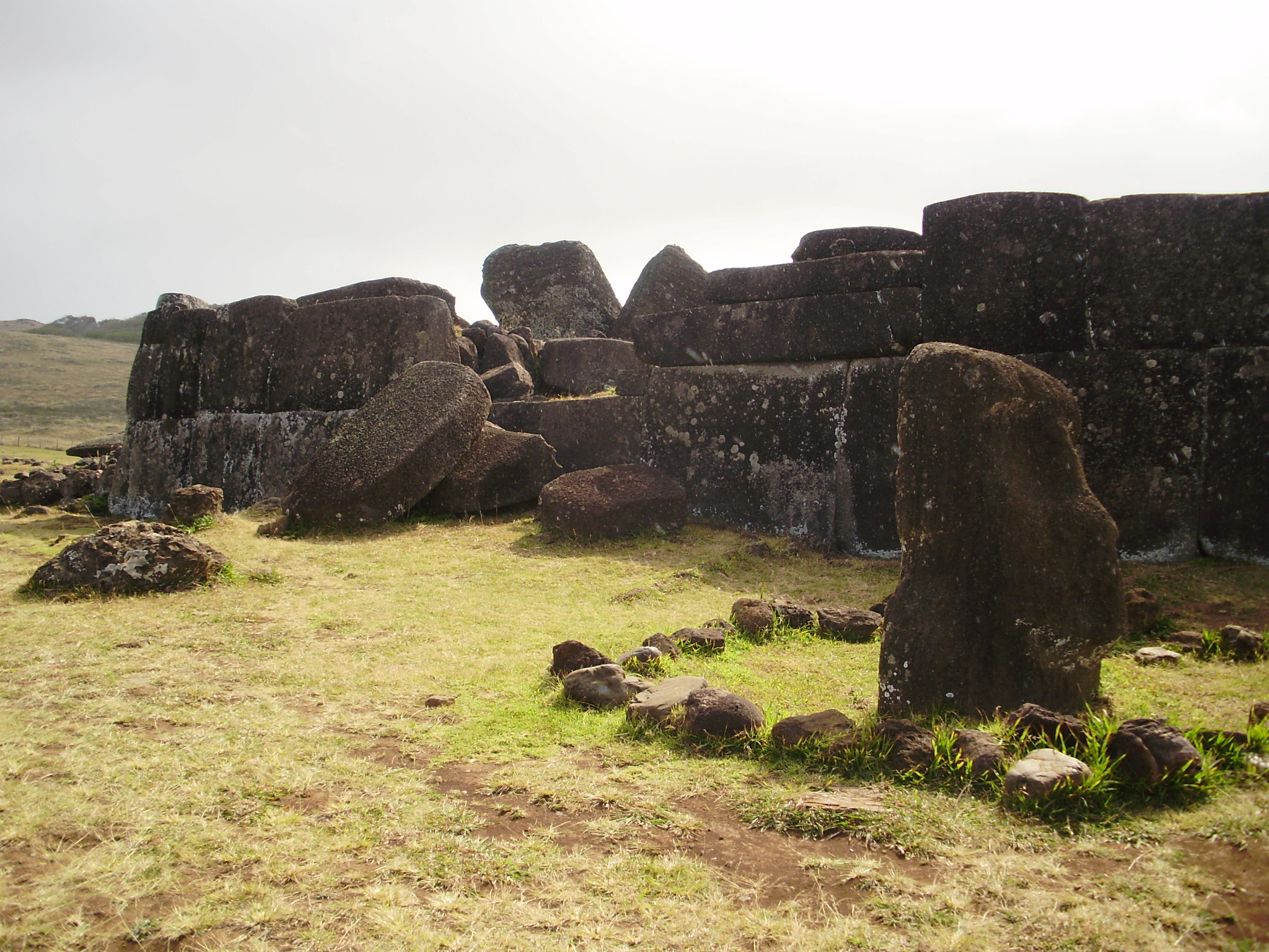 Ahu Vinapu, en Isla de Pascua, Chile.